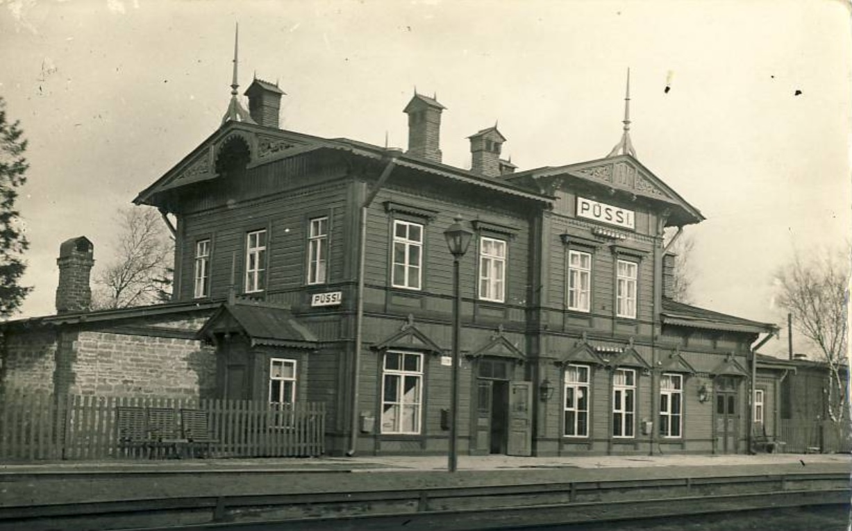 Püssi jaamahoone valmis koos raudteega 1870. aastal. Kahekorruseline kroonuhistoritsistlik puuhoone ehitati III-IV klassi jaama tüüpkavandi järgi sarnaselt Paldiski, Kabala, Keila jmt jaamahoonetega. Jaamahooneid iseloomustab madal viilkatus ning asümmeetriline pikifassaad, mille kõrgem viiluga keskosa jagab maja ühe- ja kahekorruseliseks tiivaks. Hoone hävis II maailmasõjas. This image on crowdsourcing geotagging platform Ajapaik